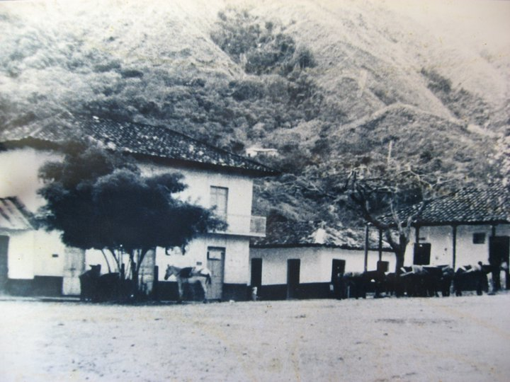 Plaza central del Casco Urbano 1954, el edificio tras el arbusto es lo que aún se denomina Alcaldía Municipal